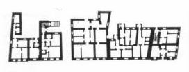 Брэст. План забудовы вуліцы 17 Верасня